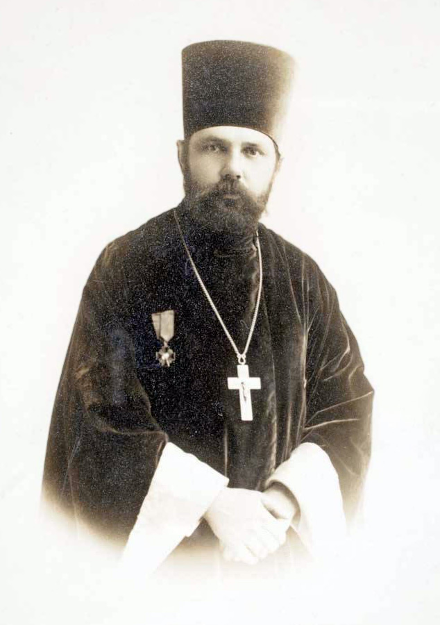 Протоиерей Феодор Пашковский